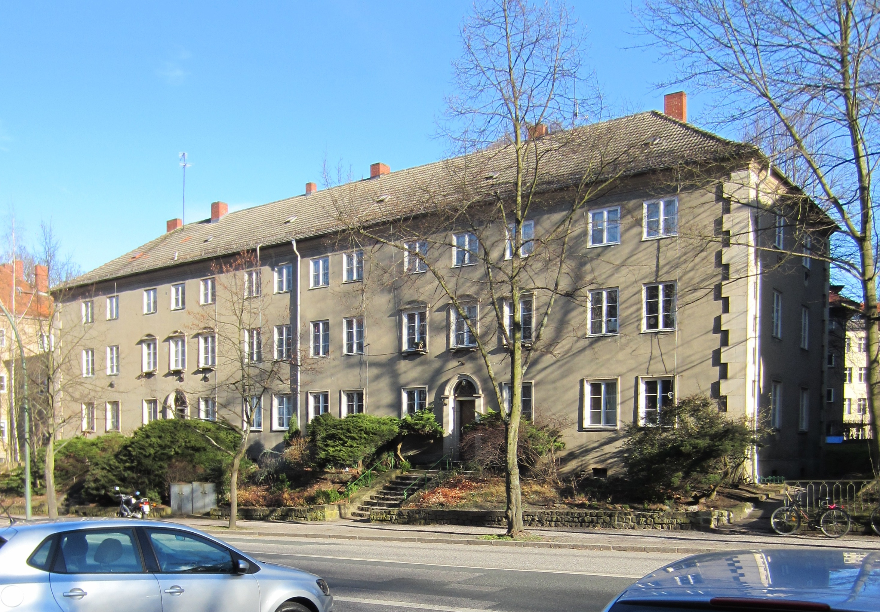 Denkmalgeschützte Häuserzeile in Potsdam, Brauhausberg 30-31; 1934–1936: Wohnbebauung auf dem Brauhausberg in Potsdam, Albert-Einstein-Straße 2–24 / Am Brauhausberg 25–36 von Heinrich Laurenz Dietz